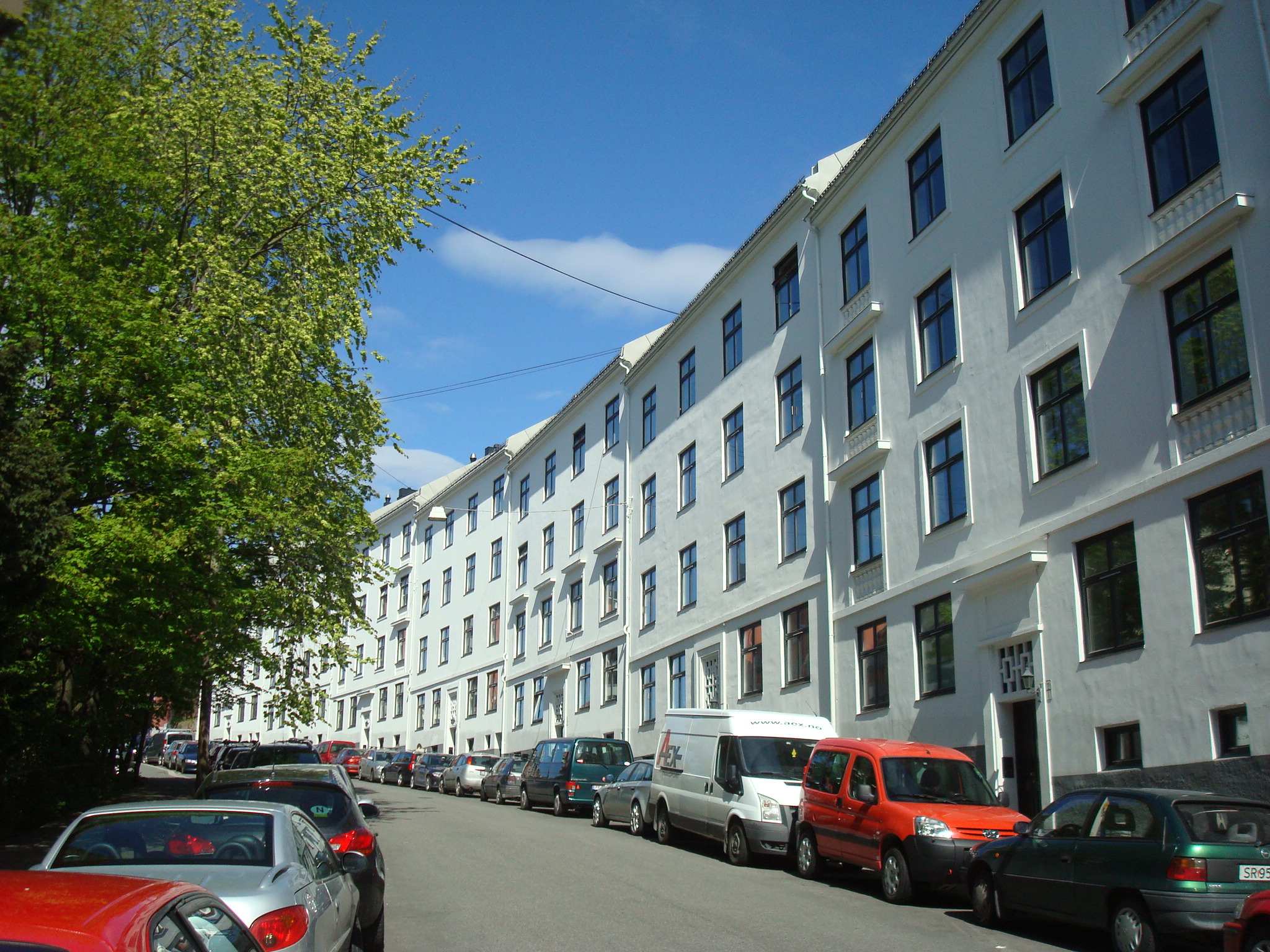 Vøyensvingen i Oslo. Sett oppover fra Kingos gate.